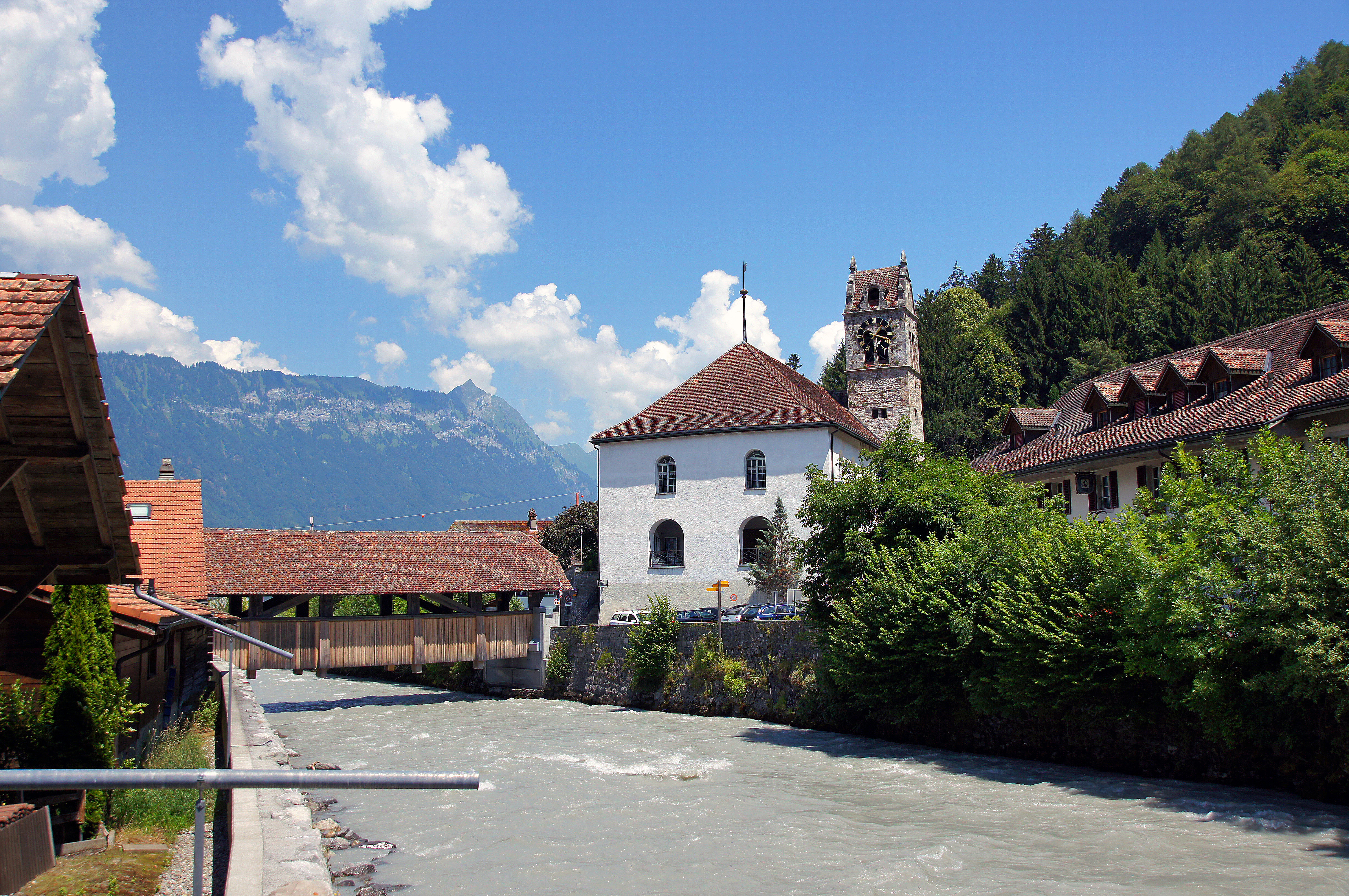 Gedeckte Holzbrücke über die Lütschine nach Gsteigwiler